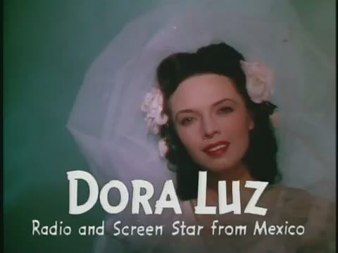 Imatges del tràiler de la pel·lícula "Los Tres Caballeros". Els tràilers de les pel·lícules publicats abans de 1964 als Estats Units es troben en domini públic